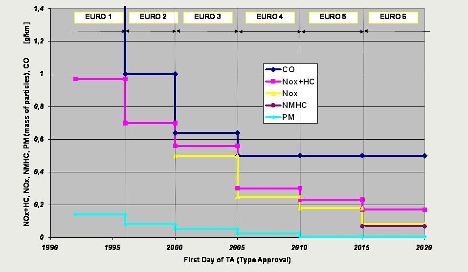 Das Bild zeigt die Entwicklung der Schadstofflimitierung innerhalb der Europäischen Union von Anfang an bis heute, Euro 6 für die Limitierung bei Dieselmotoren.